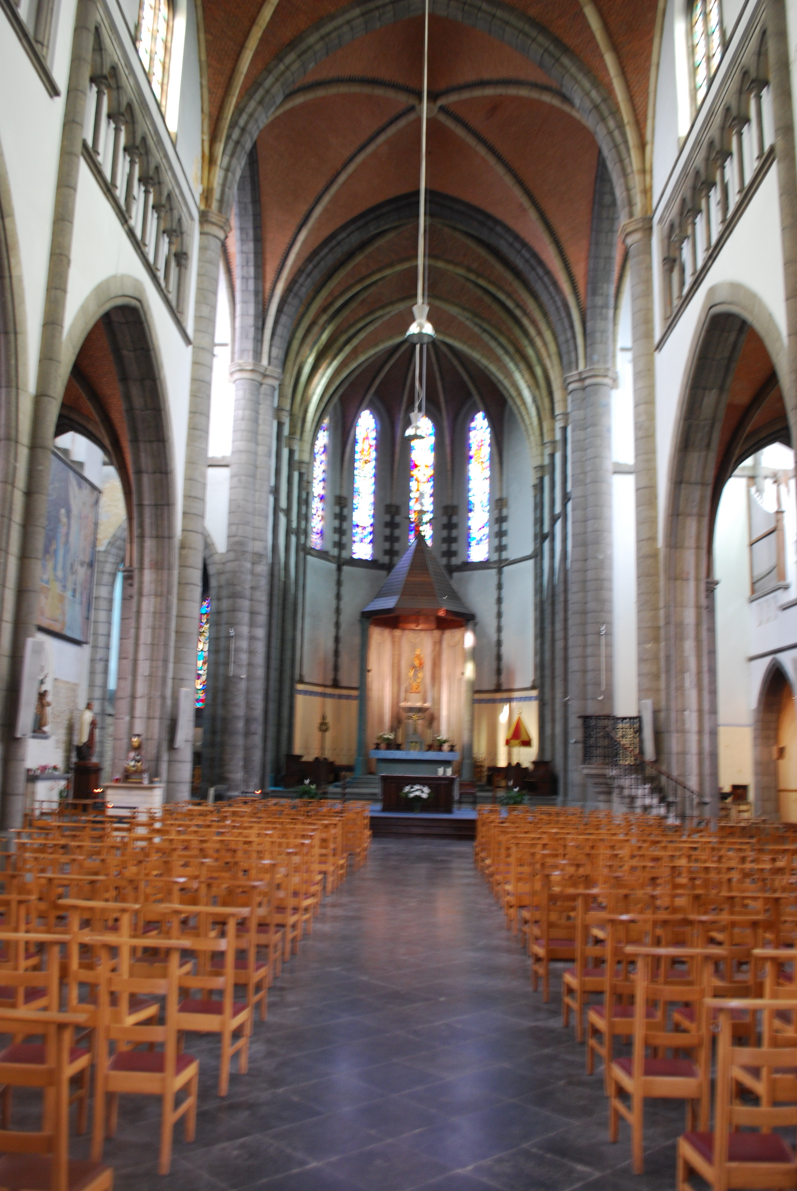 Vue intérieure de la basilique Notre-Dame de Chèvremont, à Chaudfontaine.